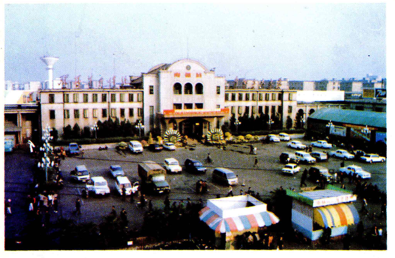 1959年的南昌站